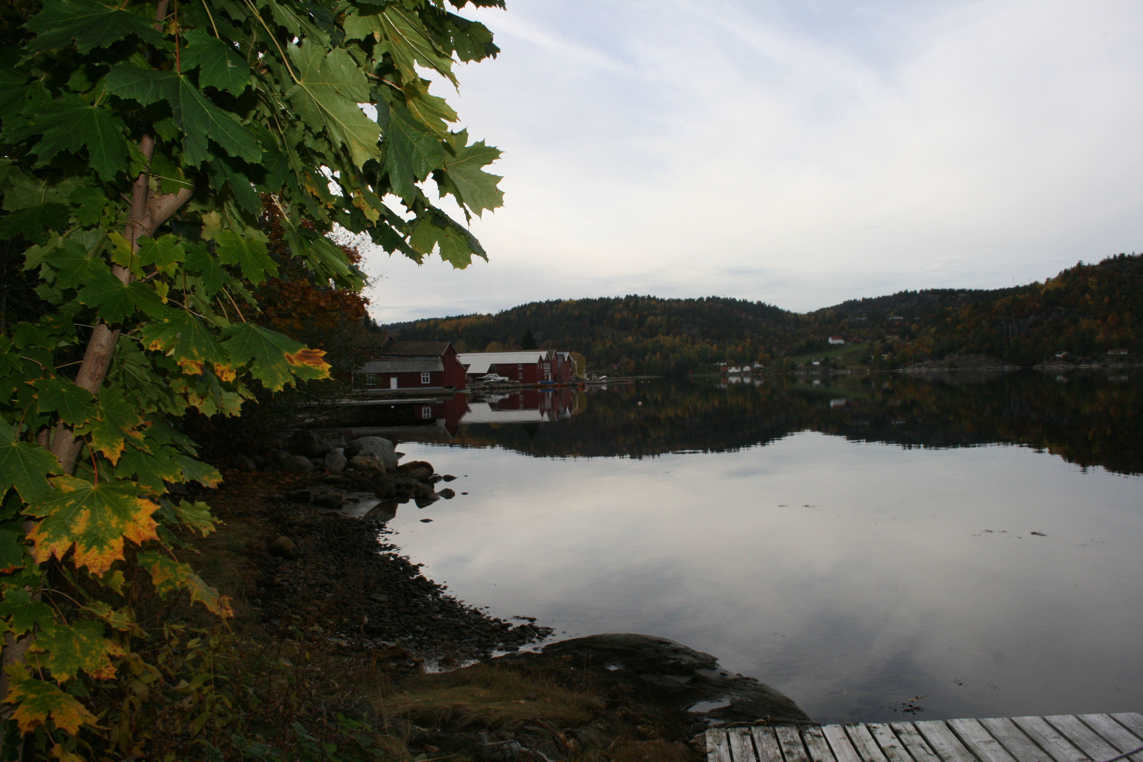 Moen i Søndeled